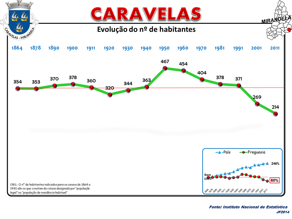 Evolução da População 1864 / 2011